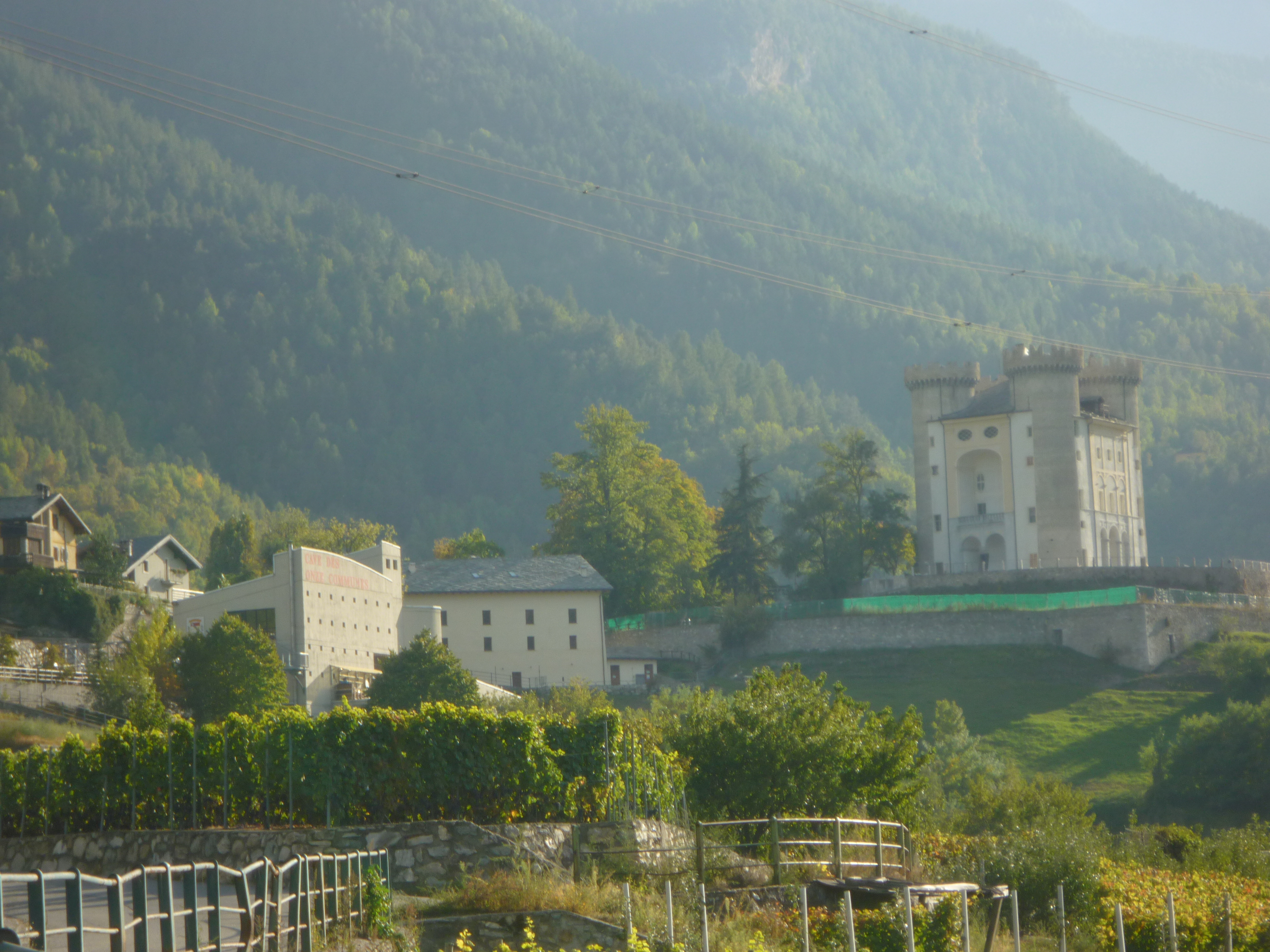 Cave des onze communes, Aymavilles - Vallée d'Aoste